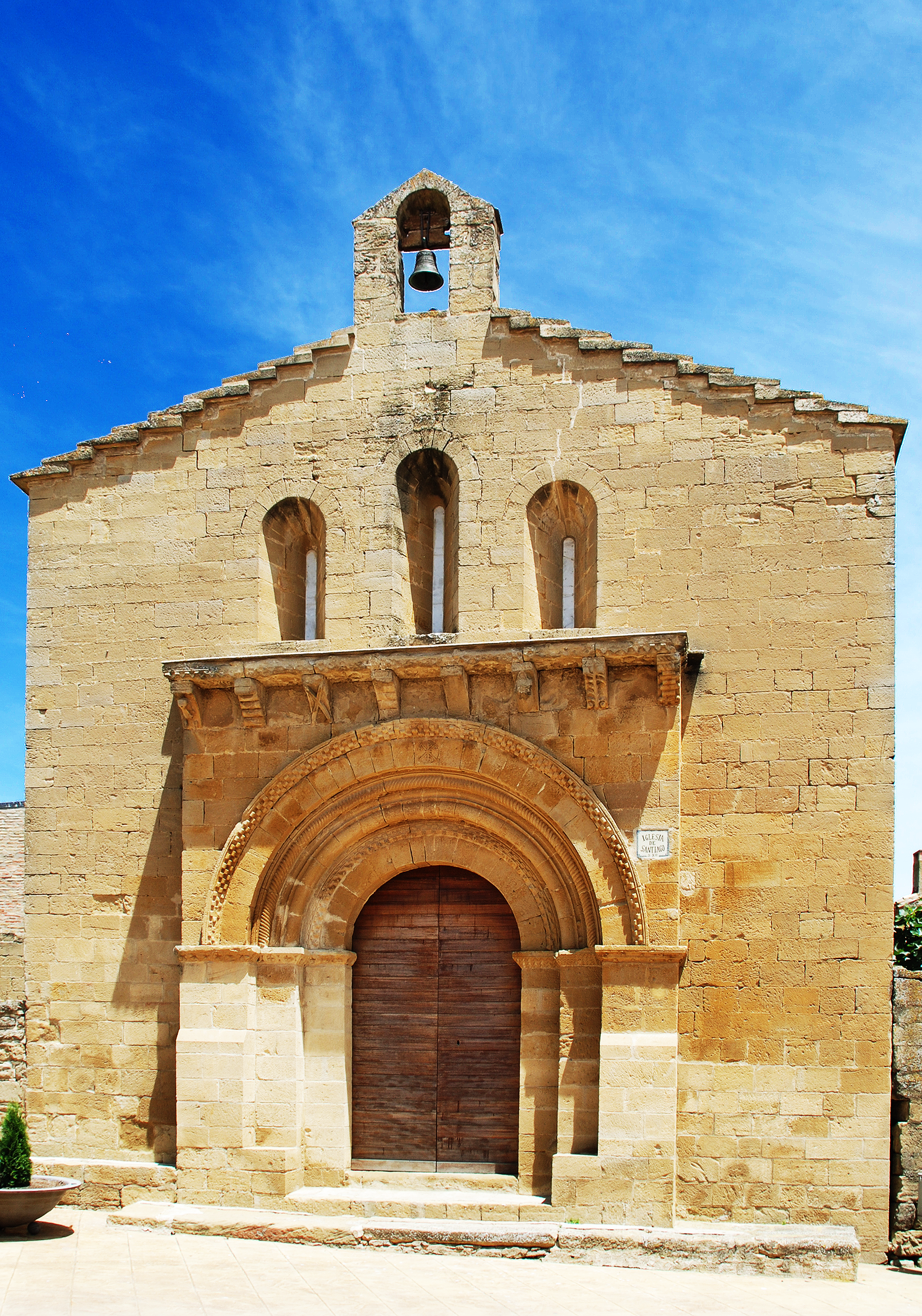 Iglesia de Santiago de La Corona, LUNA (Zaragoza), España, románico s. XII.